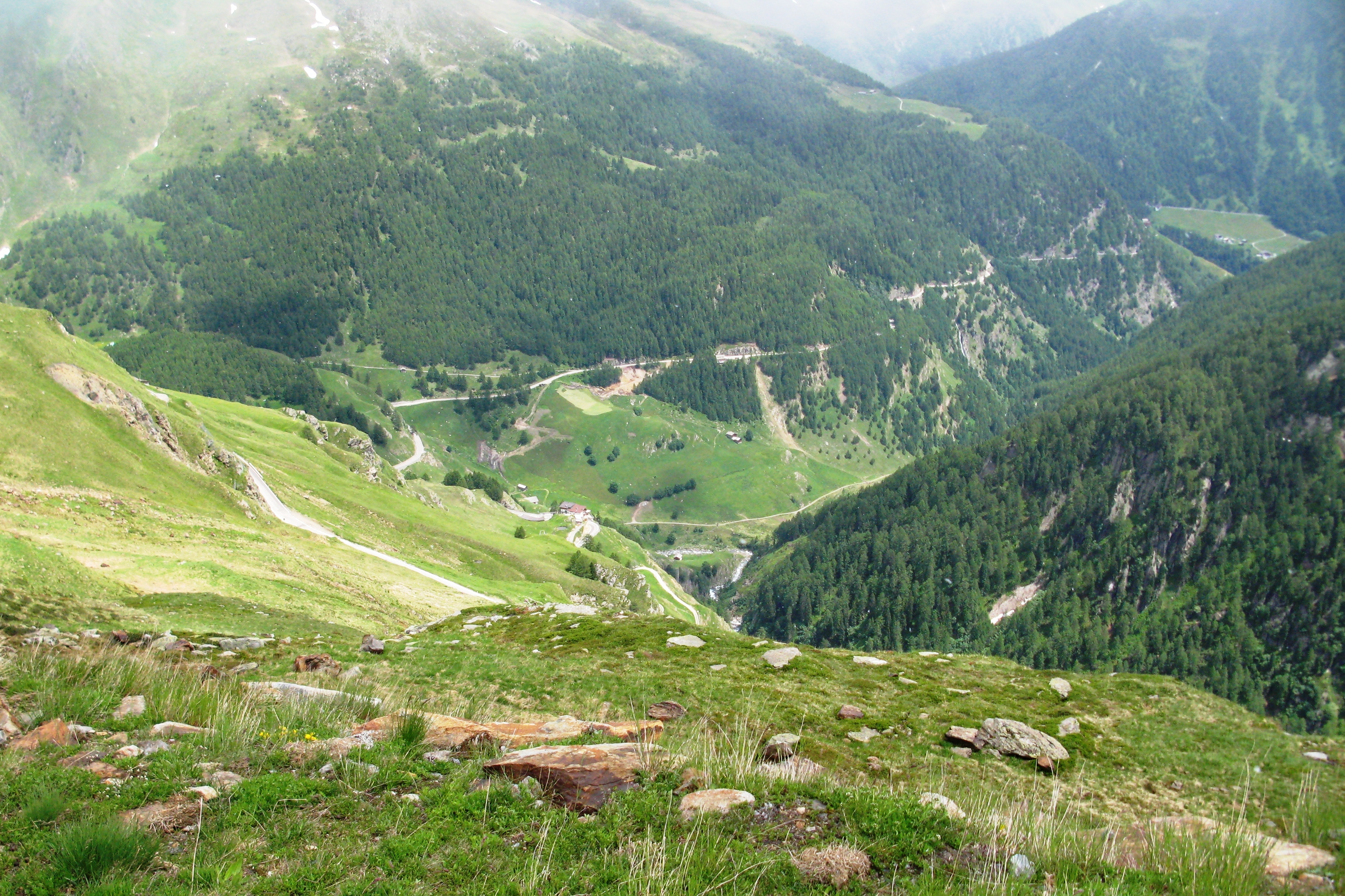 Vu vum Km 26 op Strooss SS 44Bis vum Timmelsjoch an den Dall vun der Passer. Kategorie:Stroossen an Italien